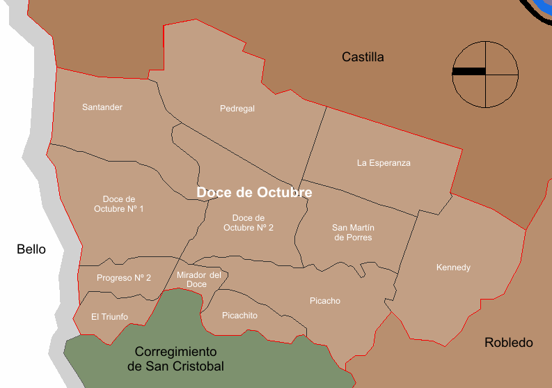 mapa de la división barrial de la comuna 12 de Octubre. Medellín, Colombia.